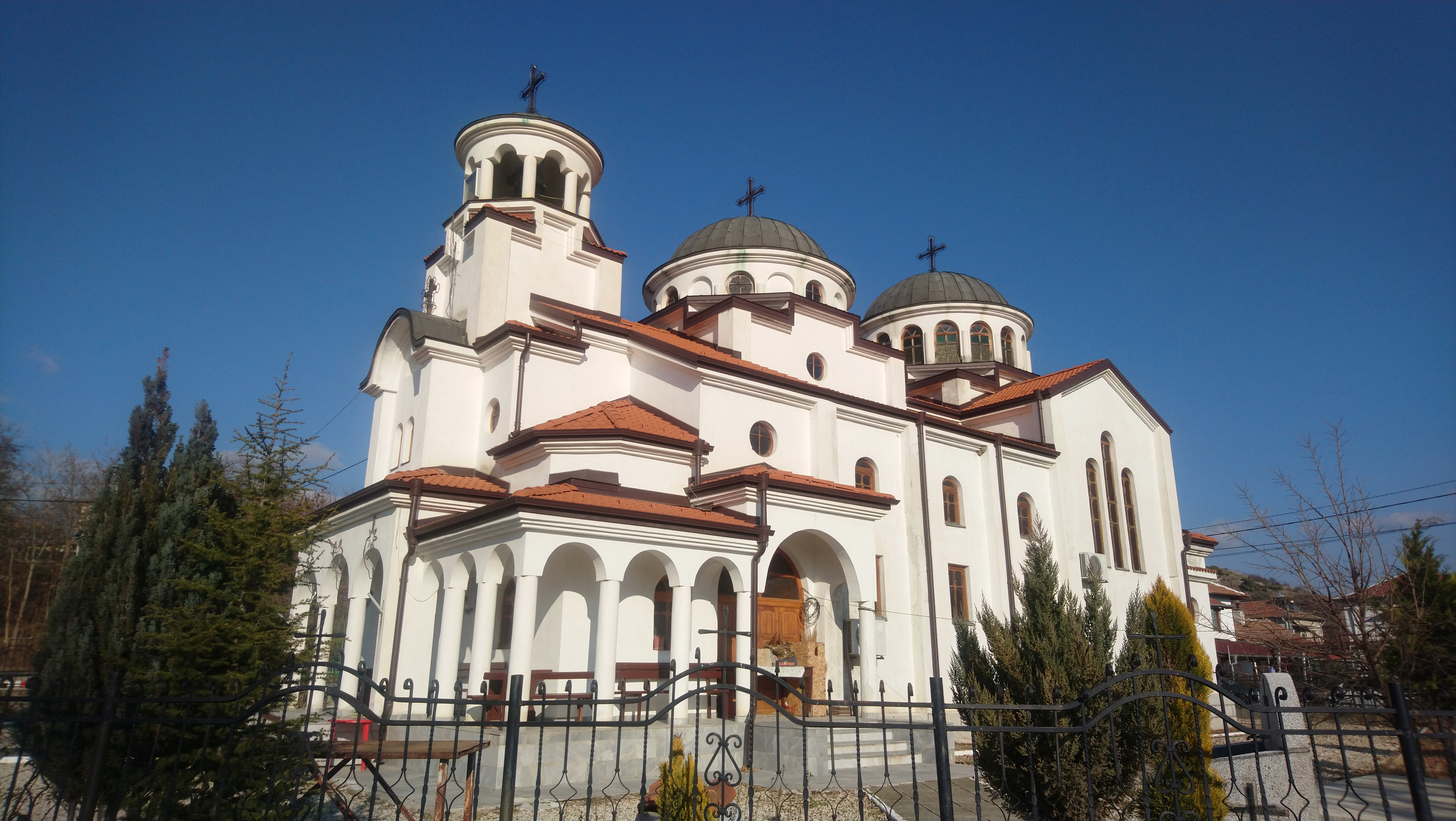 Църква „Свети Атанасий“, село Кулата